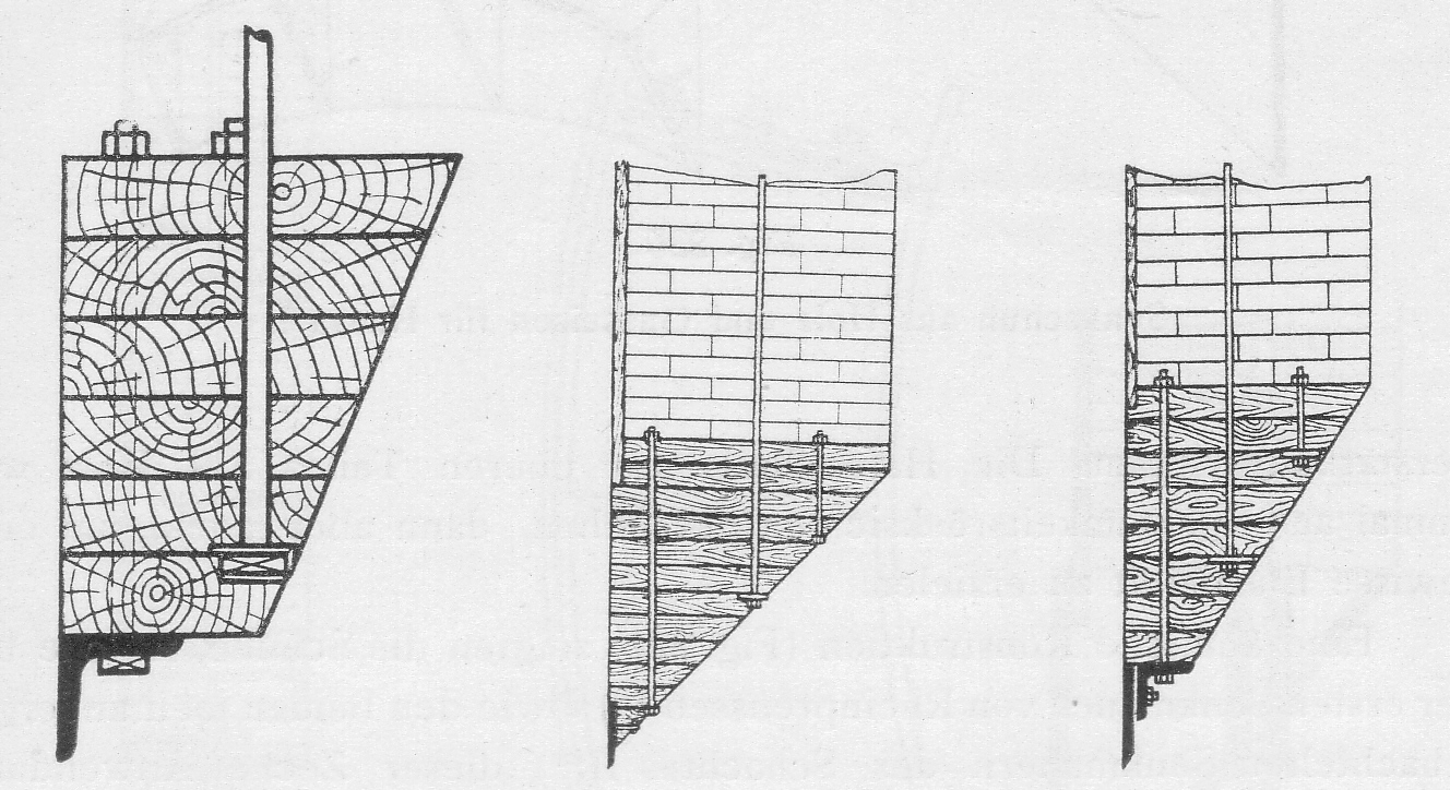 Senkschuhe